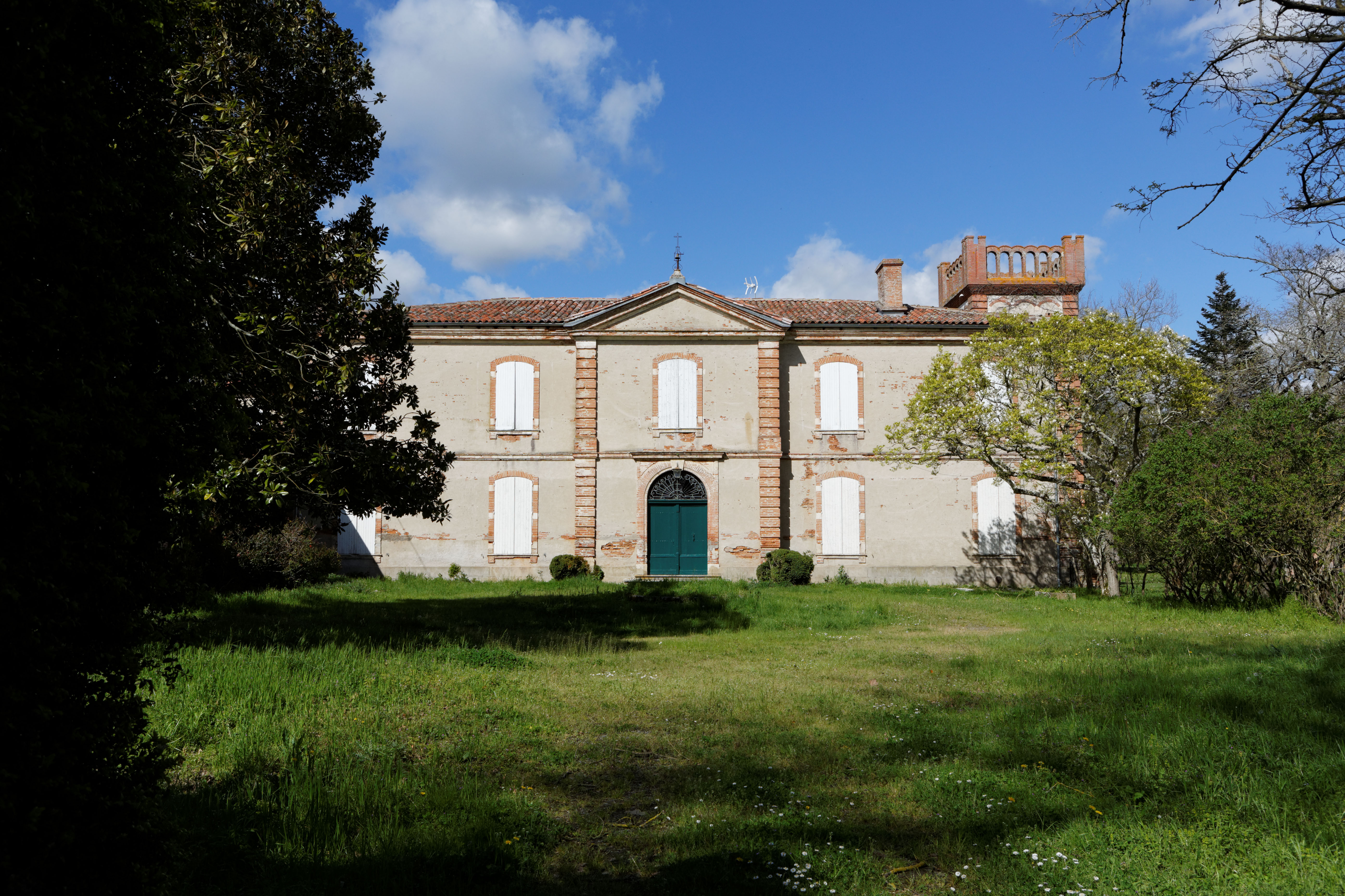 Frouzins (Haute-Garonne, France) - Château des Demoiselles. .